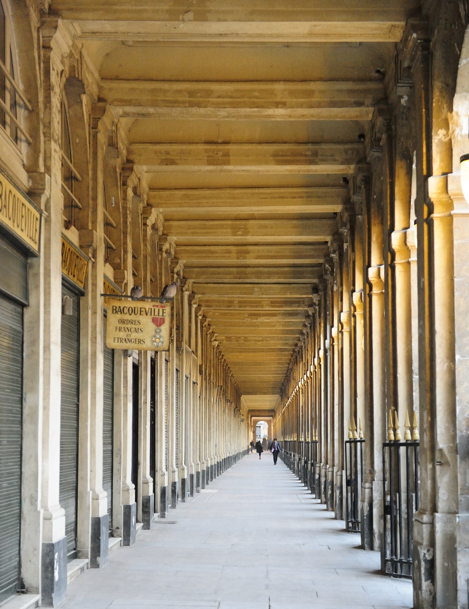 Galerie de Montpensier